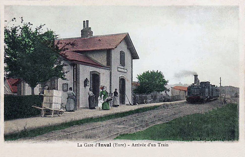 La gare d'Inval, Neaufles-Saint-Martin (Eure) - Arrivée d'un train.